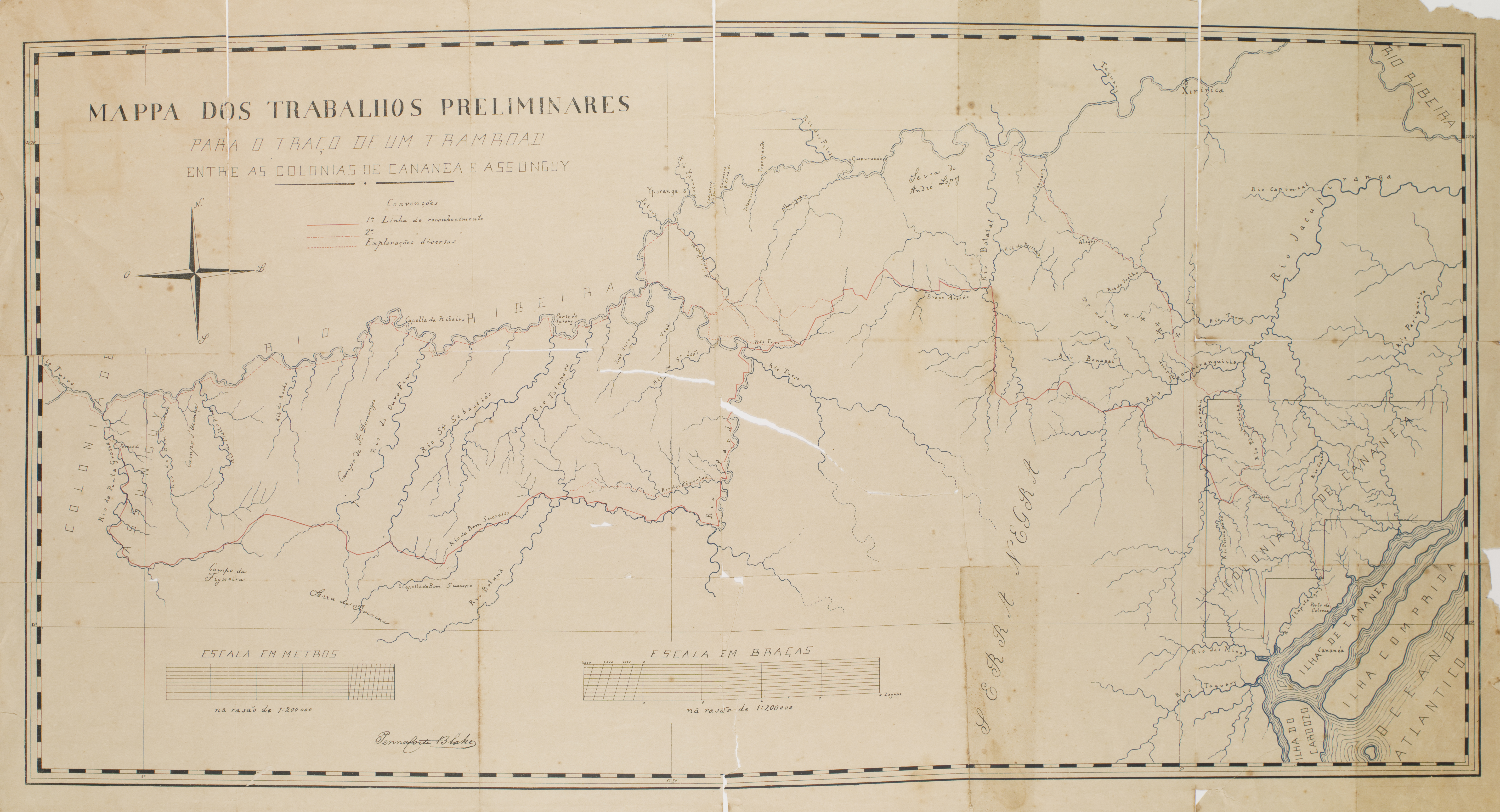 Obra que integra o acervo do Museu Paulista da USP. Coleção João Baptista de Campos Aguirra